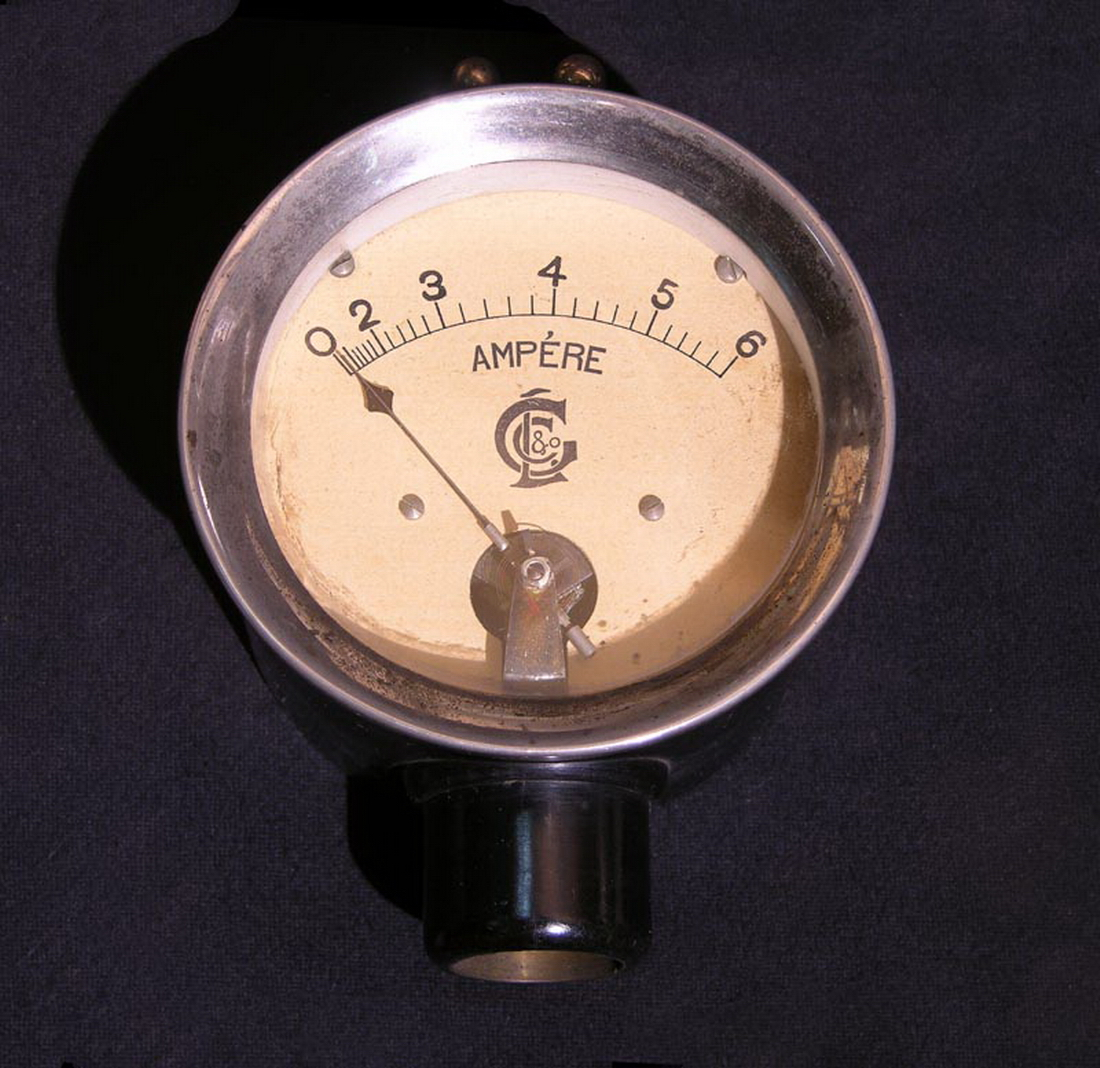 Strumento di misura dalla forma tipicamente circolare. Tutta la superficie superiore è occupata dal quadro di lettura che è protetto da un vetro. La scala ha la forma di un arco di circonferenza ed è numerata da 0 a 6 con intervalli di 0,2. La lancetta indicatrice è imperniata nella parte inferiore del quadrante. Al di sotto dello strumento è collocato un innesto per inserirlo eventualente su un supporto mentre in alto sono posizionati alcuni connettori elettrici. Lo strumento era destinato alla misura degli ampére e quindi della quantità di corrente passante in un circuito elettrico. Funzione L'amperometro è un tipico strumento utilizzato in elettrotecnica per determinare l'intensità della corrente elettrica presente all'interno di un circuito.